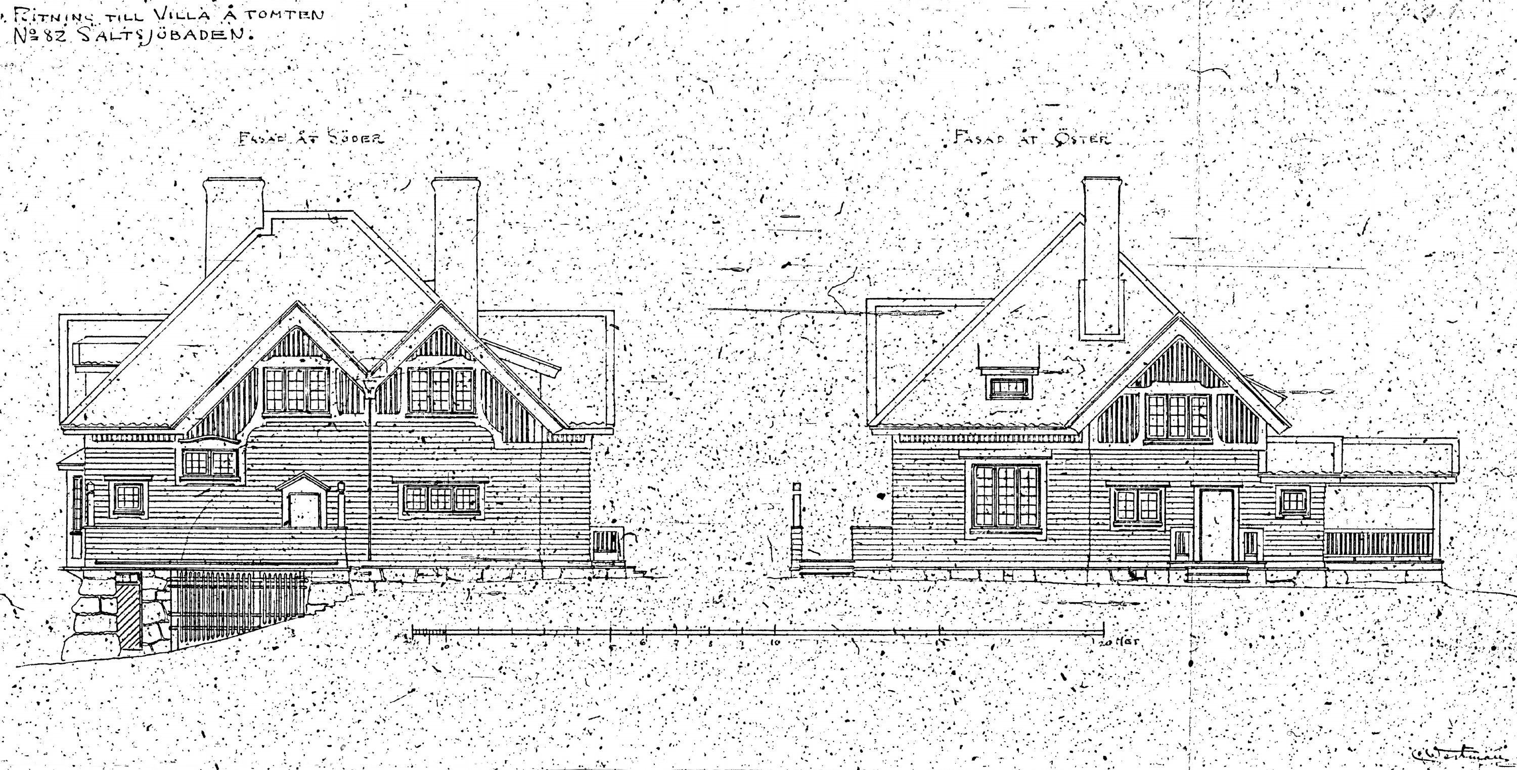 Originalritning för Publicistklubbens utlottningsvilla (Pressens villa)